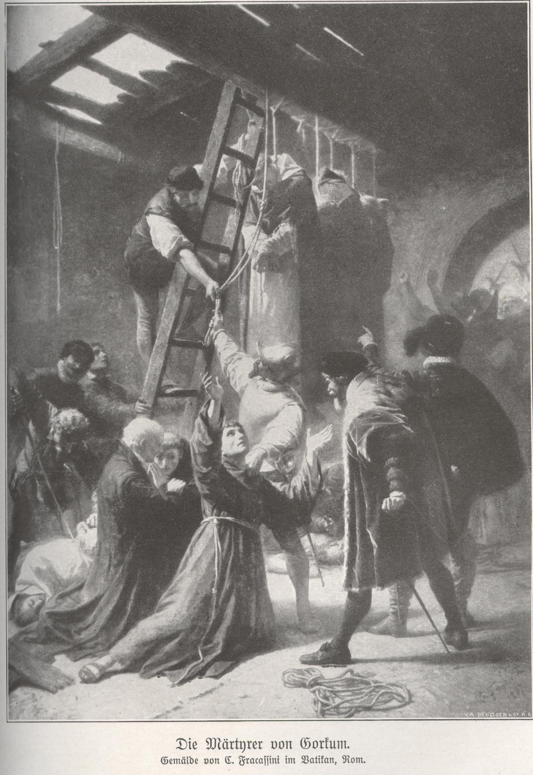 Die Martyrer von Gorkum, Gemälde